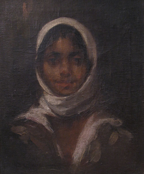 Aurel Băeşu - Cap de ţigancă, ulei pe pânză, 56x46cm, semnat stânga jos cu negru.